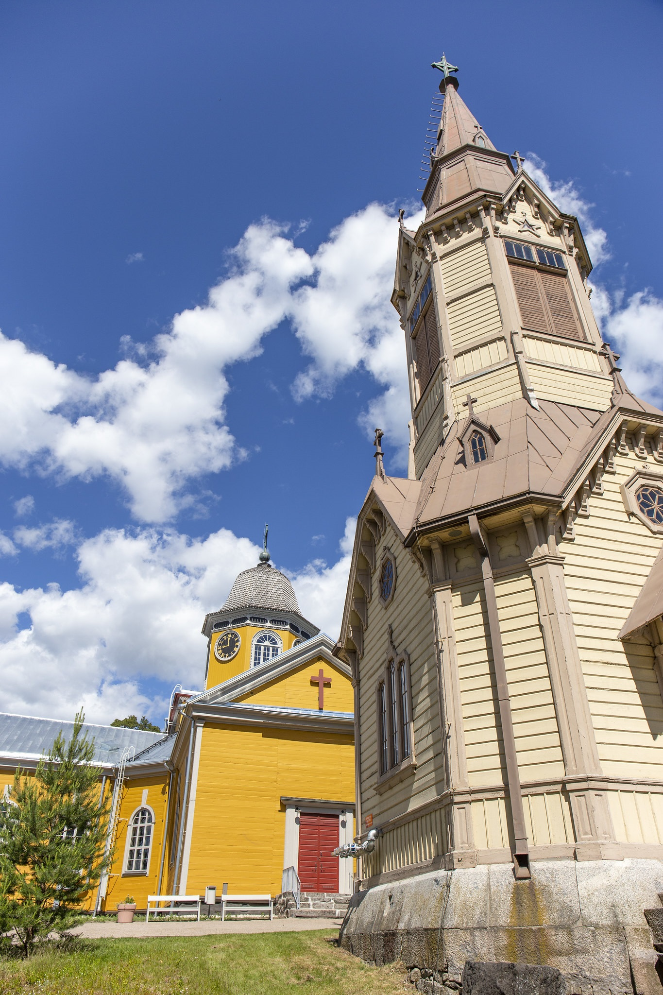 Korpilahden kirkon kellotapuli on valmistunut vuonna 1886. Sen on suunnittelut Alfred Cavén.